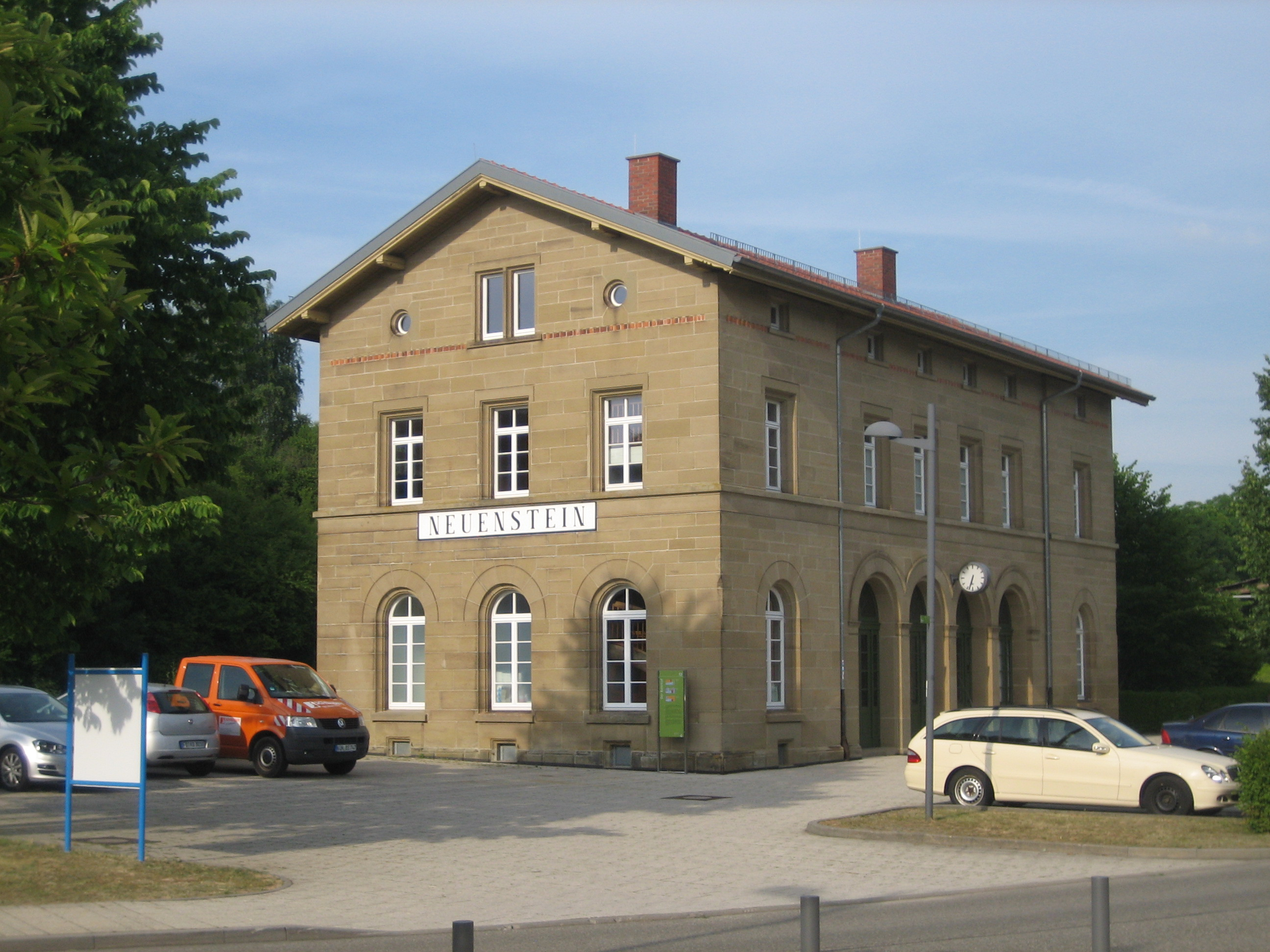 Bahnhof Neuenstein Hohenlohekreis